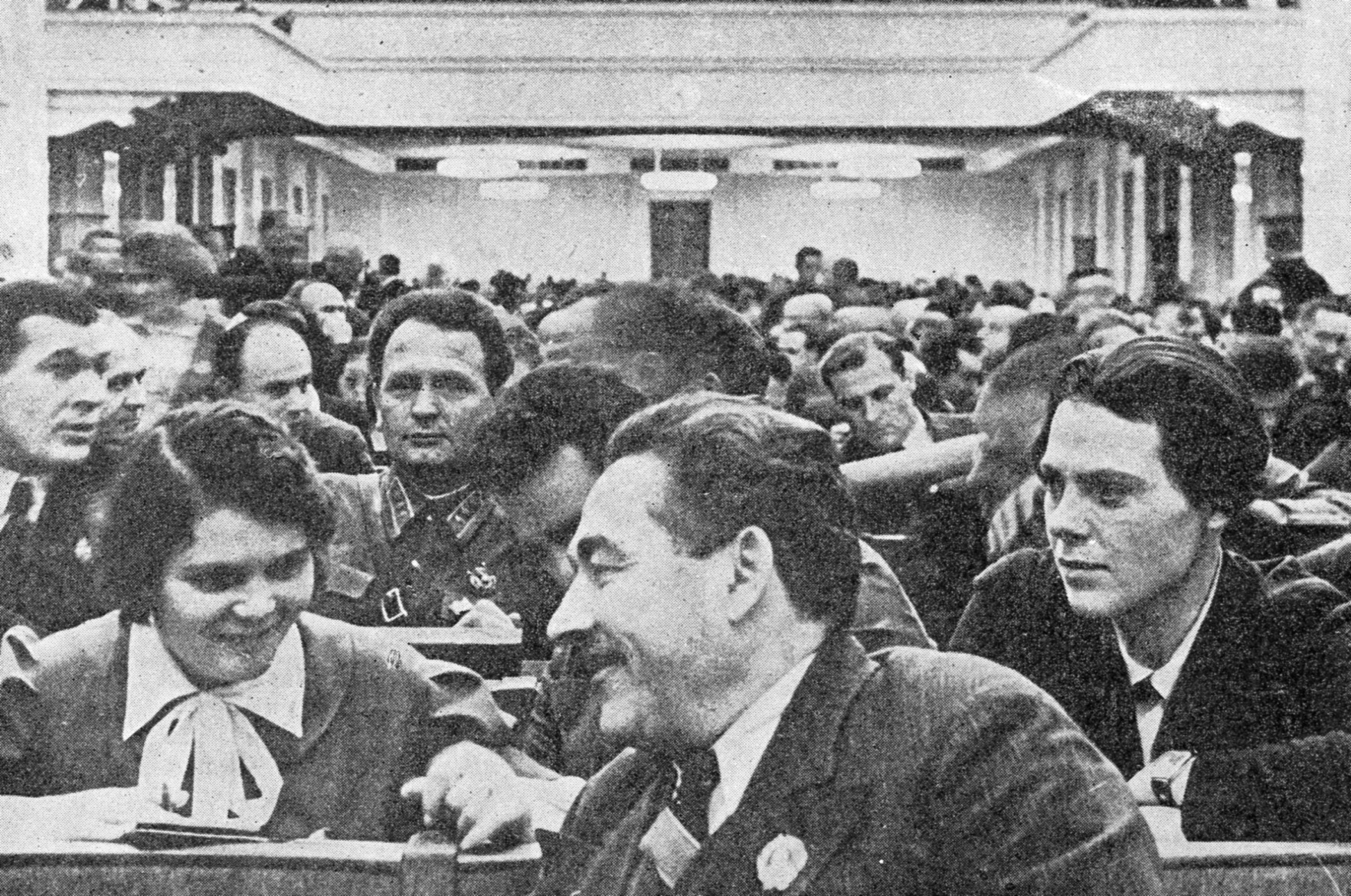 Кирило Васильович Сухомлин, 1936 рік